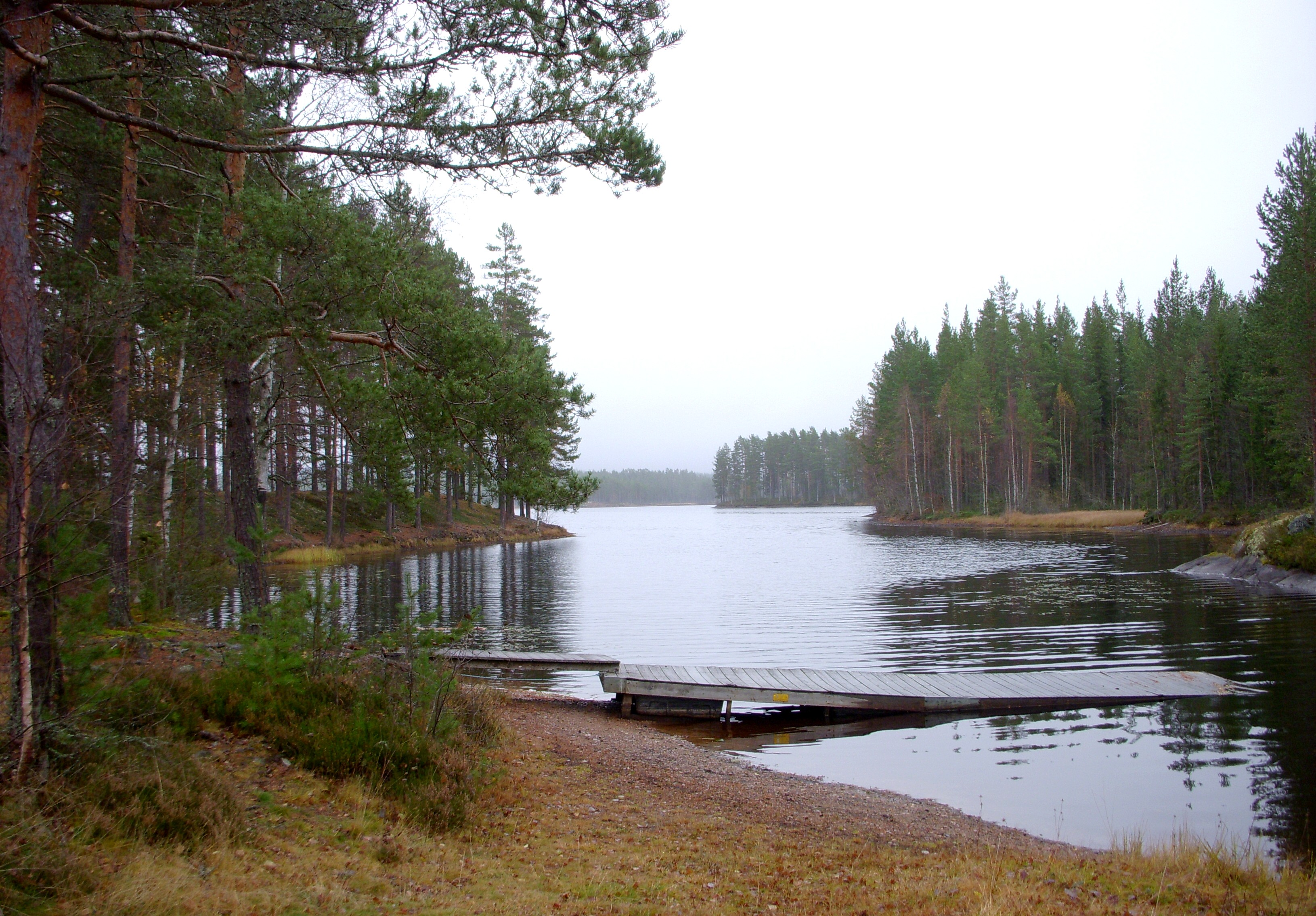 Naturreservatet "Malingarna" i Dalarna, lägerplatsen vid länsväg 247